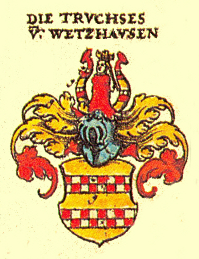 Wappen der Fränkischen Adelsfamilie Truchseß von Wetzhausen